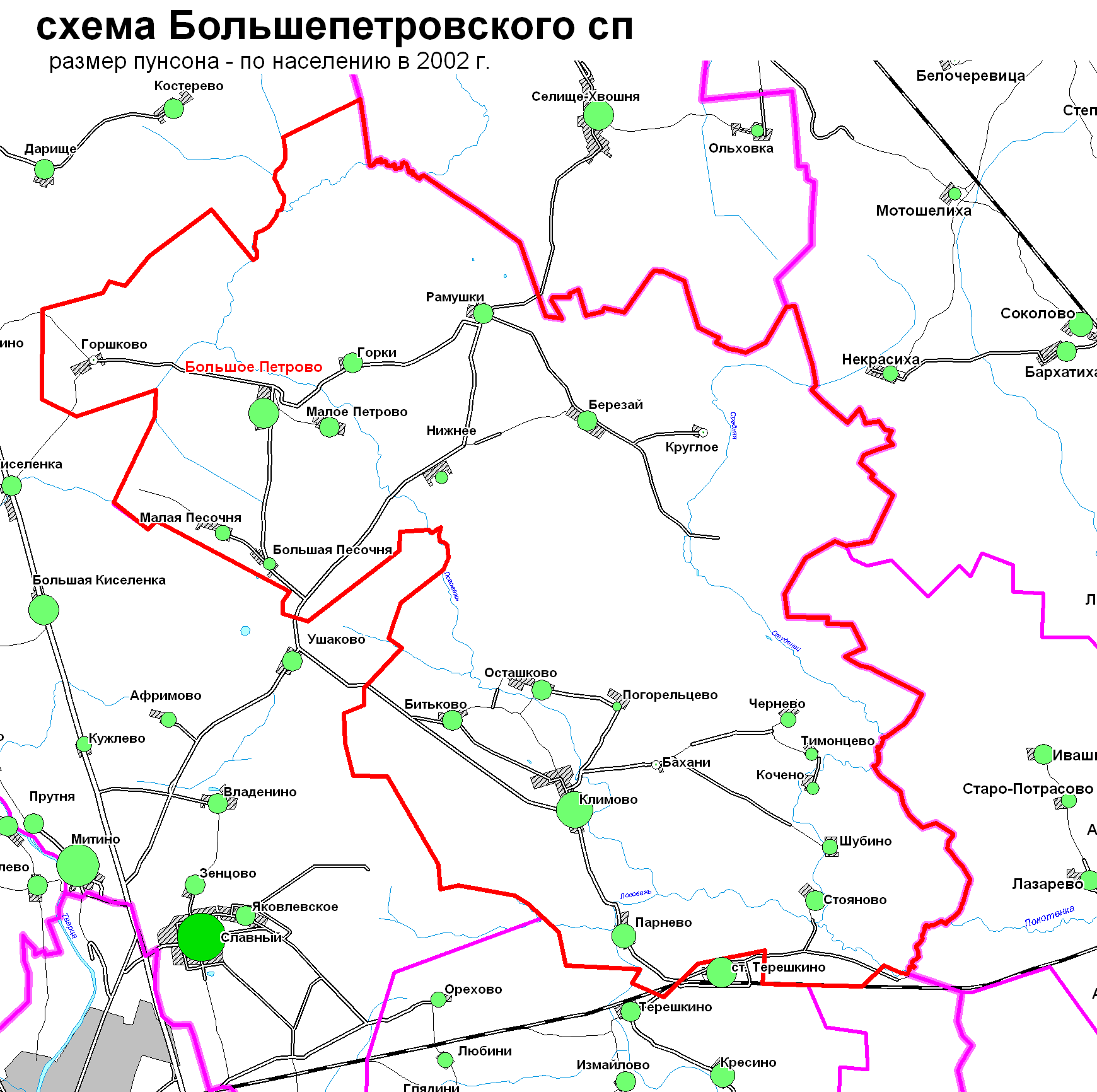 Схема Большепетровского сп в Торжокском р-не